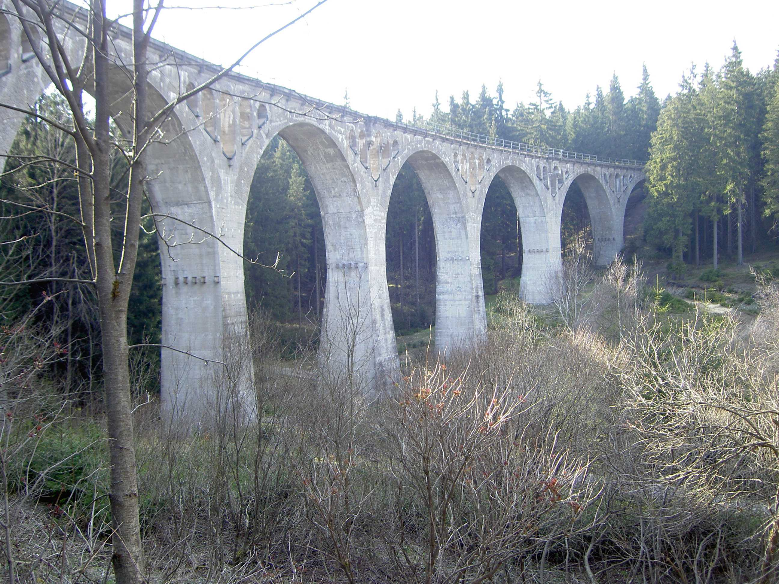 Finsterer Grund-Viadukt bei Ernstthal (OT Lauscha) am 23.04.2005 selbst fotografiert GNU-FDL